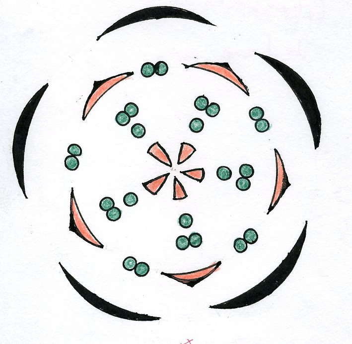 bloemdiagram Vetkruid (Sedum), Sedum floral diagram